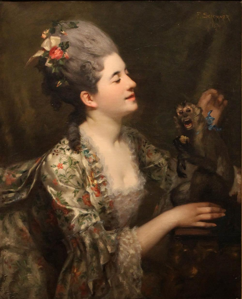 François Schommer - Portrait of a woman with her monkey, 1874. Oil on canvas: 32 x 26 in